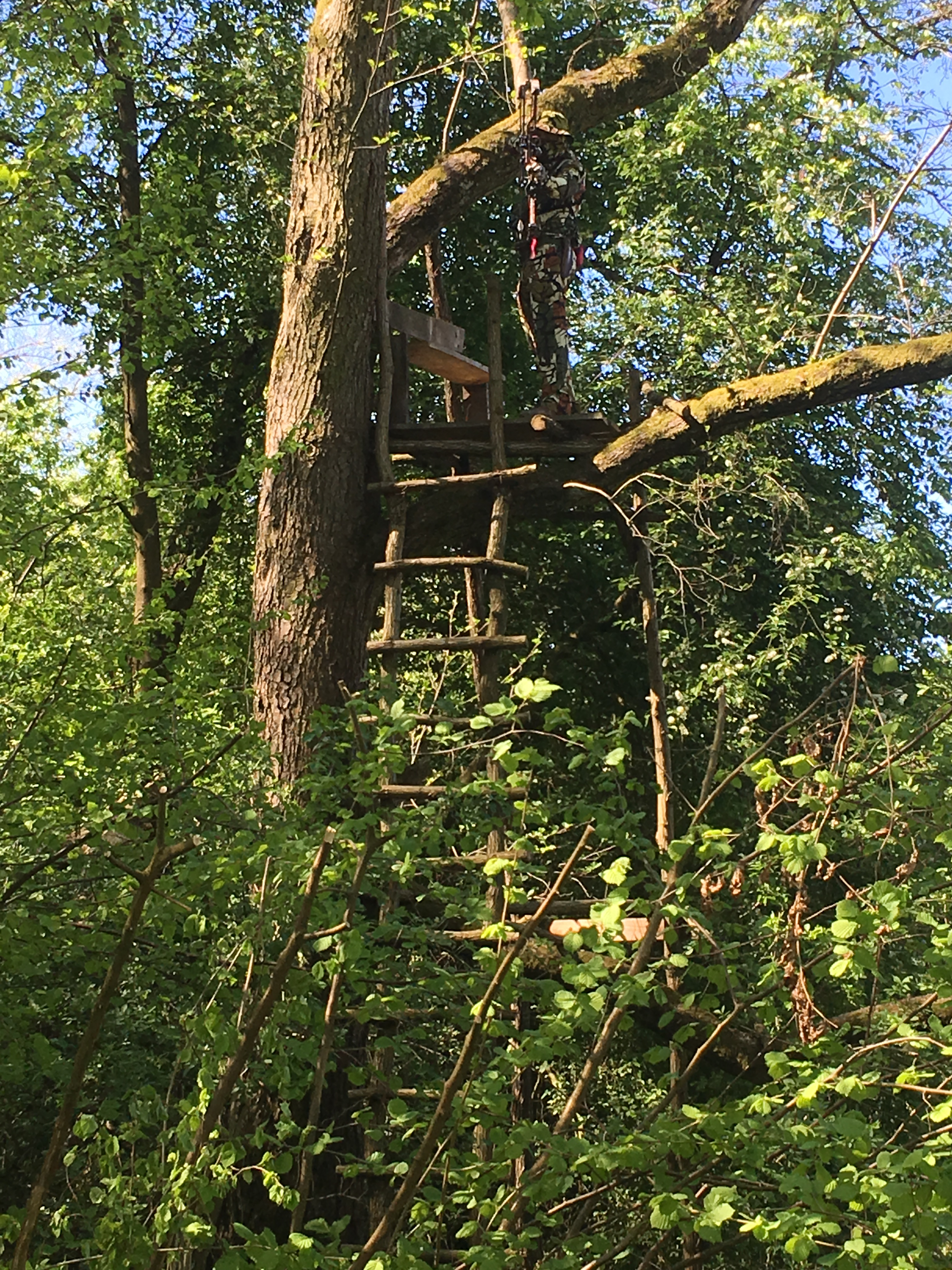 Durch den Kontrast Hell - Dunkel werden die Körperkonturen des Bogenjägers sehr gut verwischt